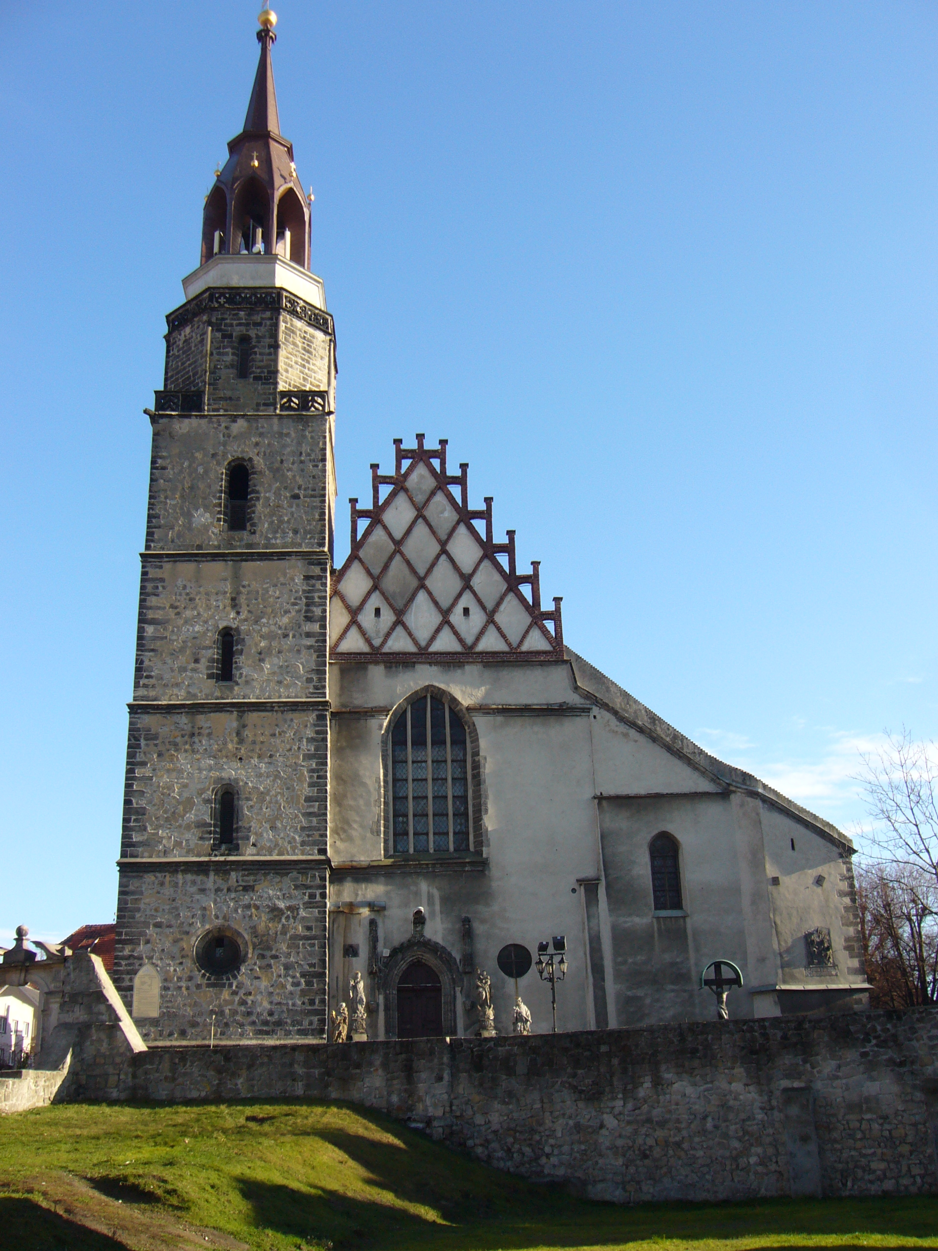 Kościół Wniebowzięcia Najświętszej Maryji Panny i Św. Mikołaja w Bolesławcu. Strona zachodnia, frontowa